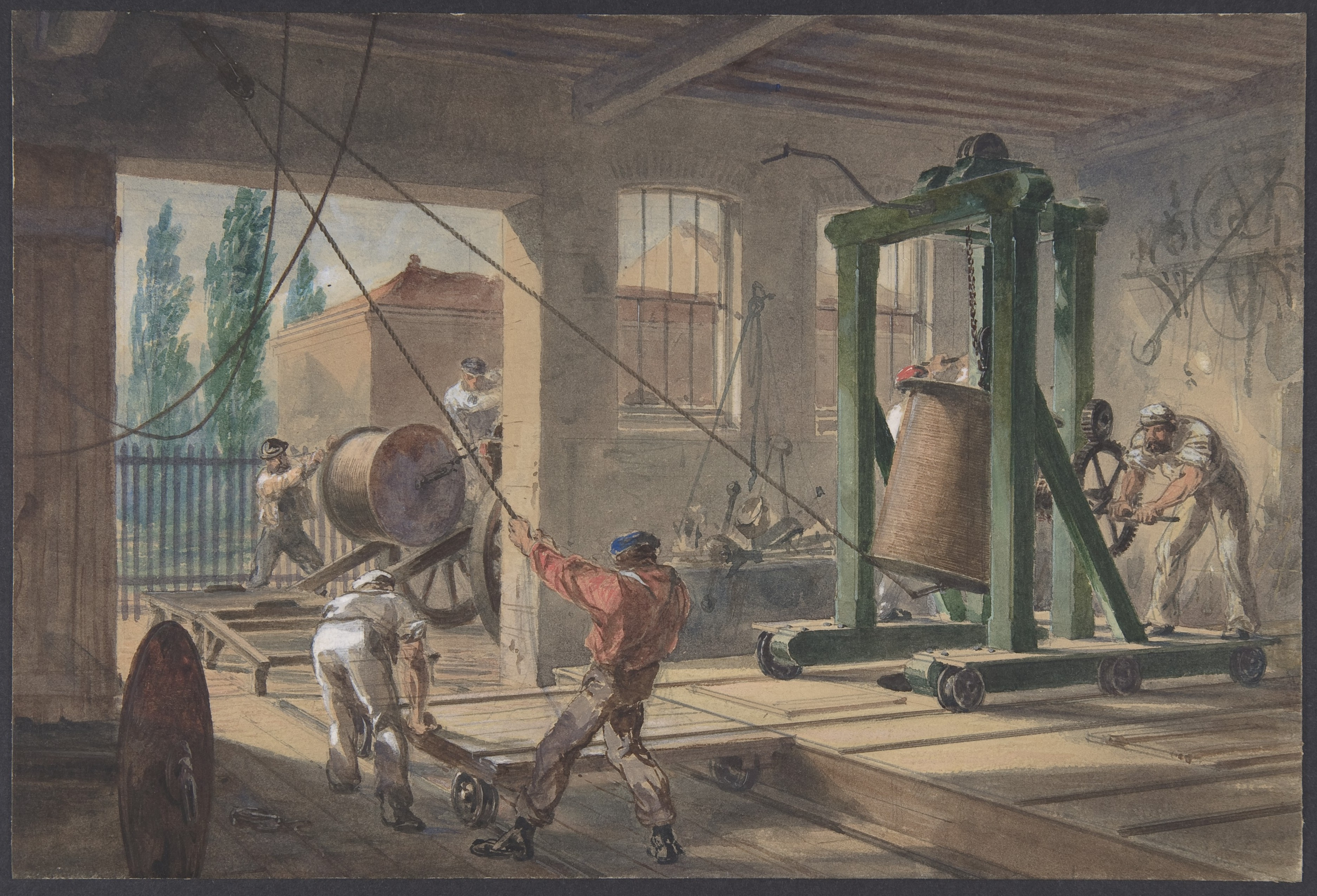 Drawing; Drawings